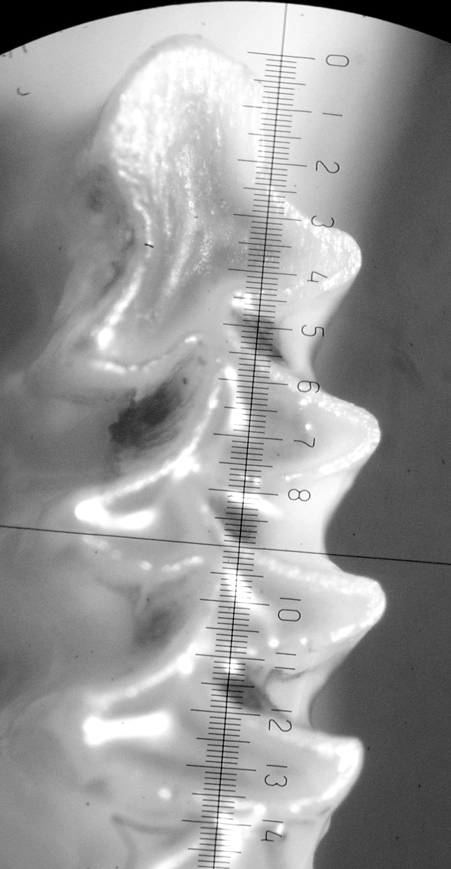 M1 Arvicola scherman gutsulius. Жуйна поверхня першого кутнього зуба нориці гірської (Arvicola scherman gutsulius)